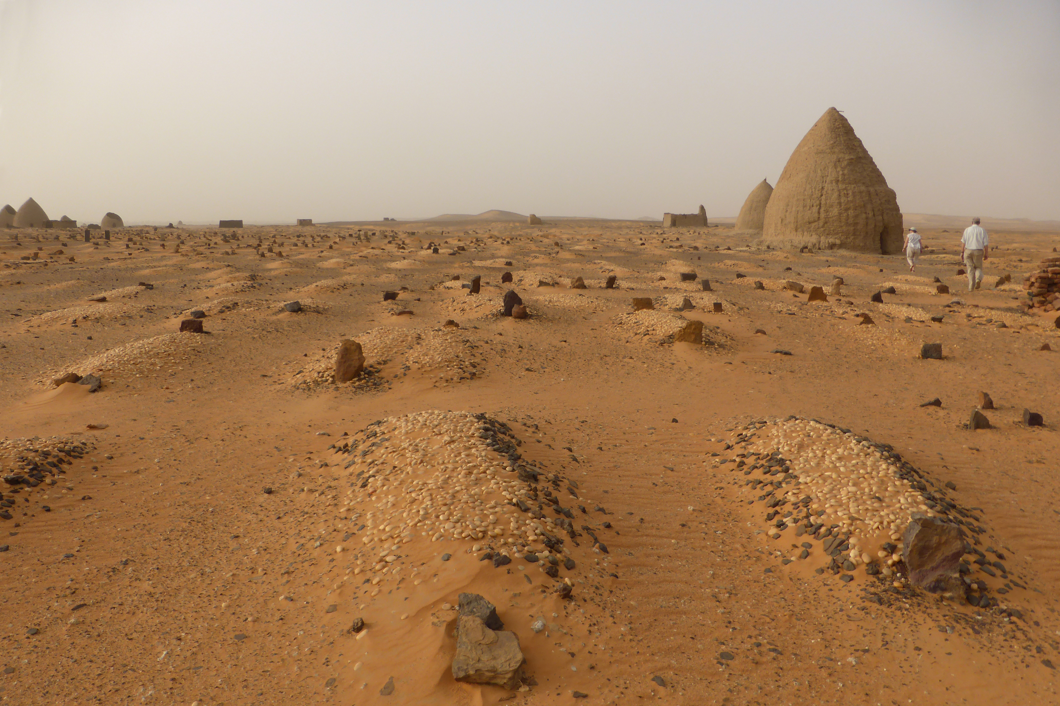 Old Dongola graveyard